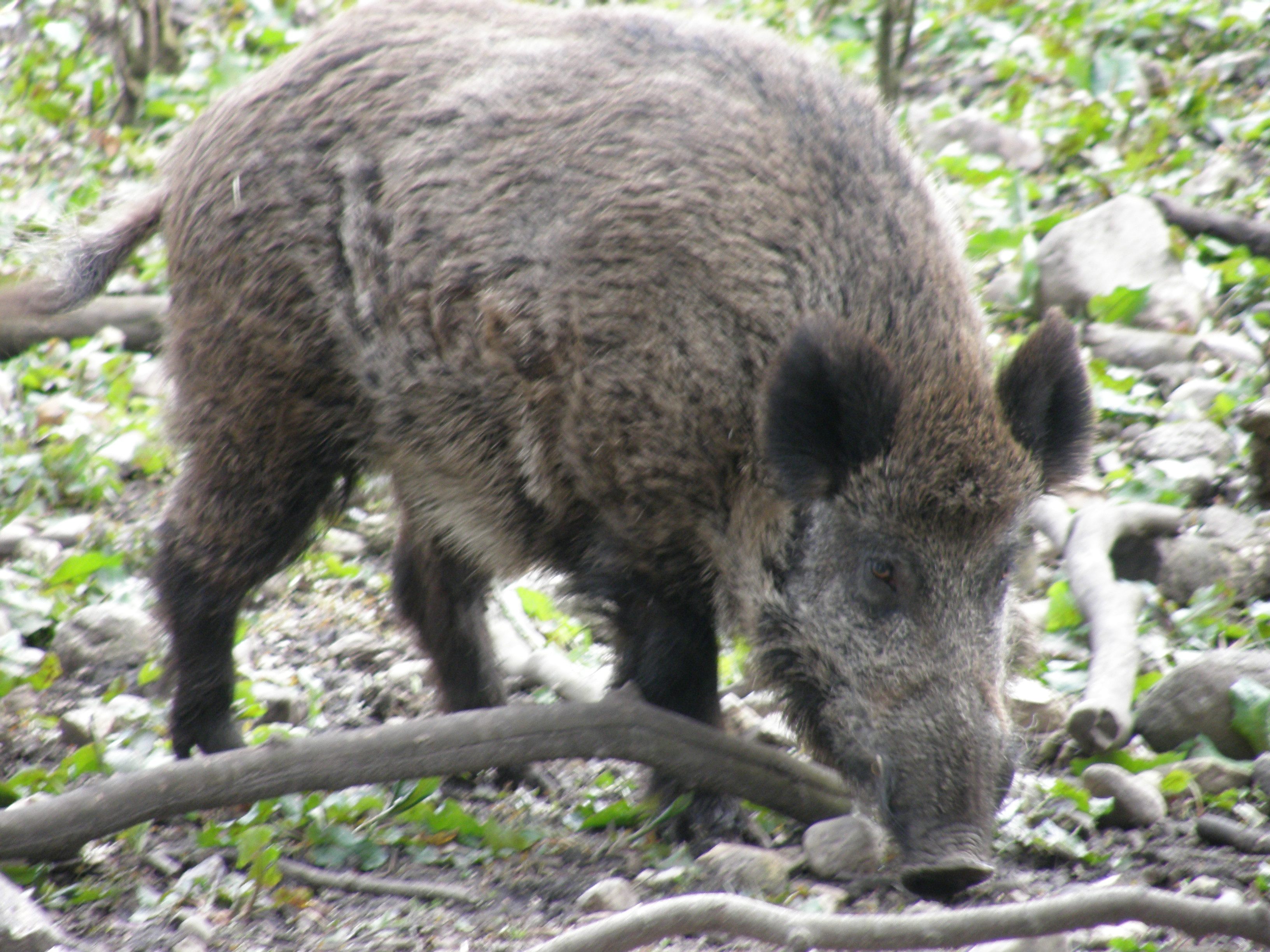 Wildschwein, Wild boar, wood near Kiel